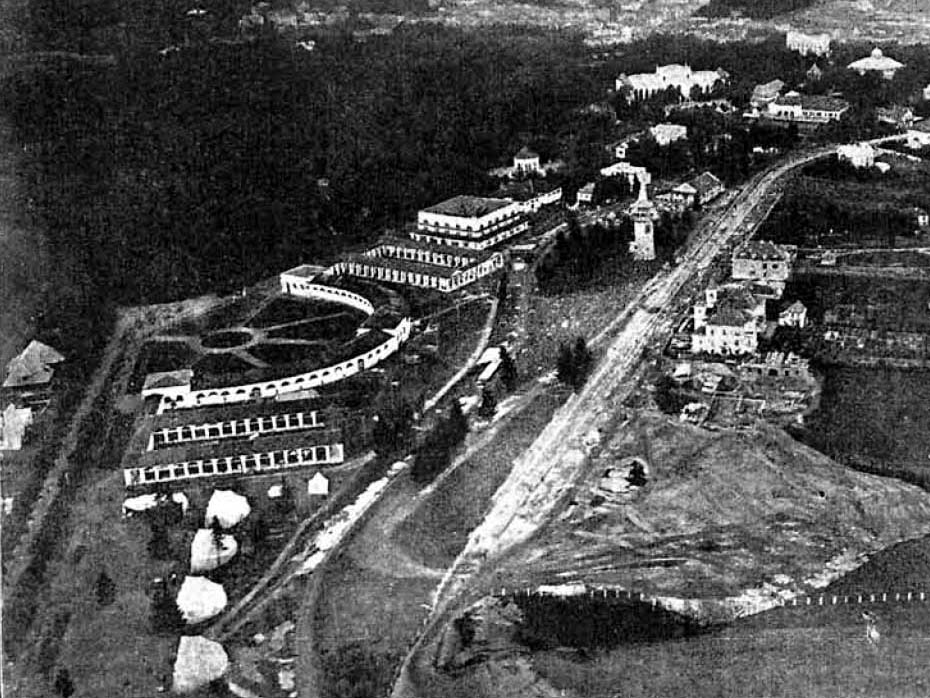 Східні торги у Львові. Видно кінцеву ділянку нинішньої вулиці Івана Франка. Панорама 1920-х років. Фотограф Мар'ян Фукс (1884-1935).